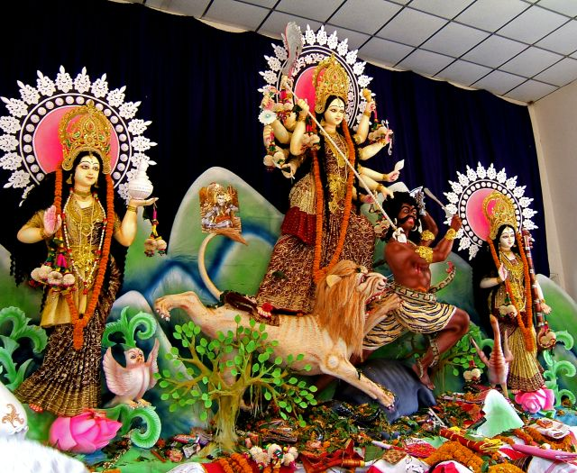 ঢাকা শহরের ঢাকেশ্বরী মন্দির এ দূর্গা পূজা উদযাপন। উৎস: Credits: Photo taken by Rajiv Ashrafi ( and BDGamer Used with permission of author. For details of the permission email, see User:Ragib/photopermissions#Rajiv_Ashrafi. Category:ঢাকা